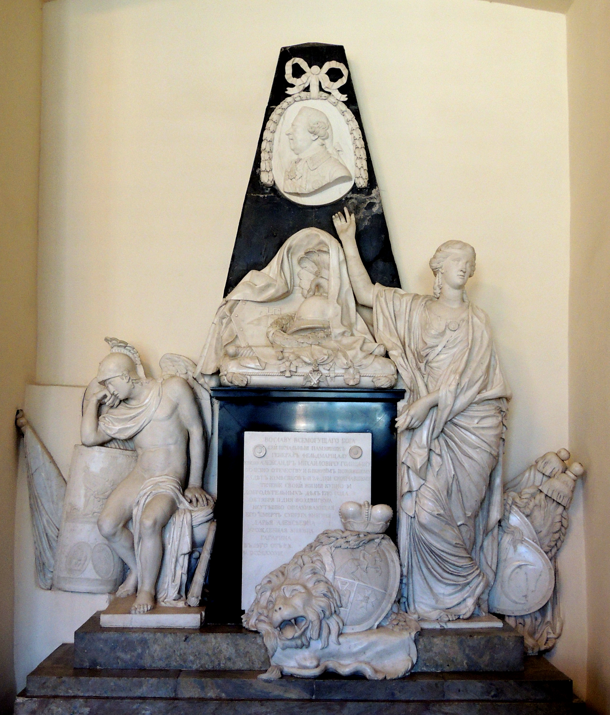 Благовещенская церковь Александро-Невской лавры. Голицын Александр Михайлович 1718-1783. Князь, генерал-фельдмаршал, генерал-адъютант, действительный камергер, сенатор. Главнокомандующий Санкт-Петербурга с января по декабрь 1775 г. и в 1780-1783 гг. Принадлежал к старинному роду. Командующий армией в русско-турецкой войне (1768-1774). Скульптурный памятник. Мрамор. Скульптор Ф.Г. Гордеев, 1788 г. Надпись: "Во славу всемогущего Бога сей печальный памятник генерал фельдмаршалу князю Александру Михайловичу Голицыну полезно Отечеству и ближним пожившем 65 лет и 10 месяцов и 24 дни скончавшему течение своей жизни купно и добродетельных дел 1783 года октября и дня воздвигнула неутешно оплакивающая его смерть супруга княгиня Дарья Алексеевна урожденная княжна Гагарнина в лето от Р.Х. M DCCLXXXVIII". День рождения 7 января (по старому стилю). День памяти 23 августа (по старому стилю).